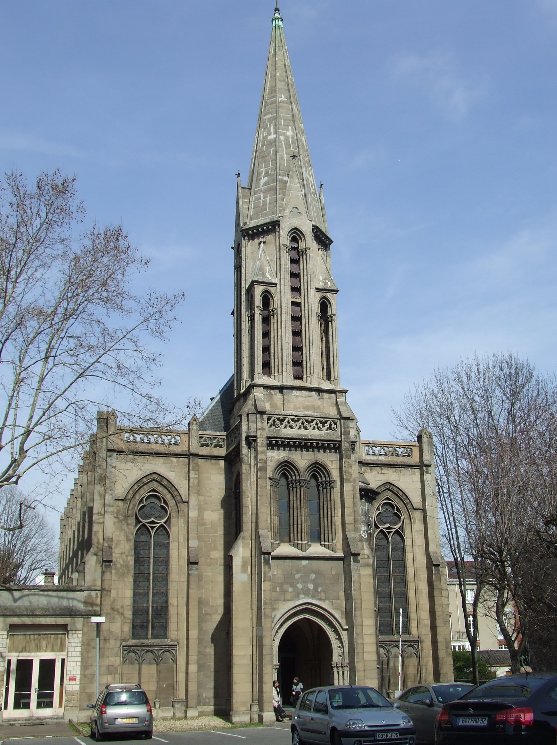 La Chapelle Sainte Jeanne d'Arc à Paris